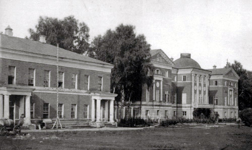 Kurakin Palace in Nadezhdino